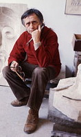 Josep Maria Subirachs, esculptor, al seu estudi a la Sagrada Familia. Barcelona, abril 1987